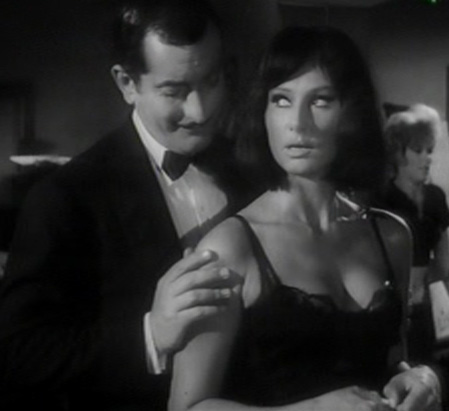 Riccardo Garrone e Annie Gorassini nel film Due mattacchioni al Moulin Rouge (1964) Fotogramma, da Rai3.